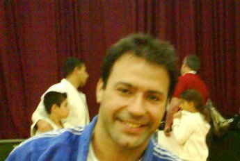 אריק זאבי המדליסט האולימפי